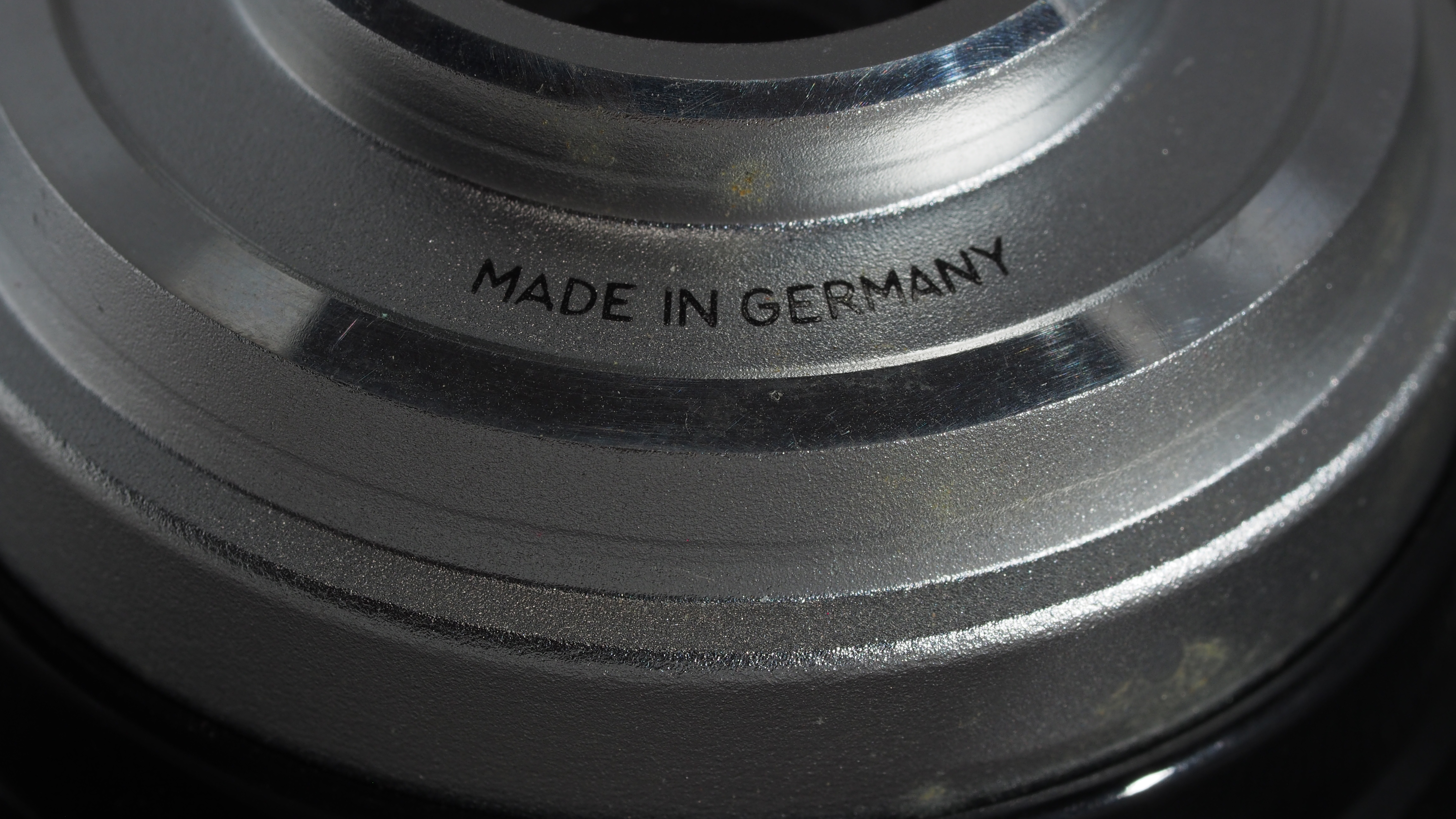 Click Made in Germany unter Frontlinse